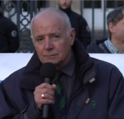 Le général Christian Piquemal lors d'une manifestation contre l'immigration massive, à Versailles.